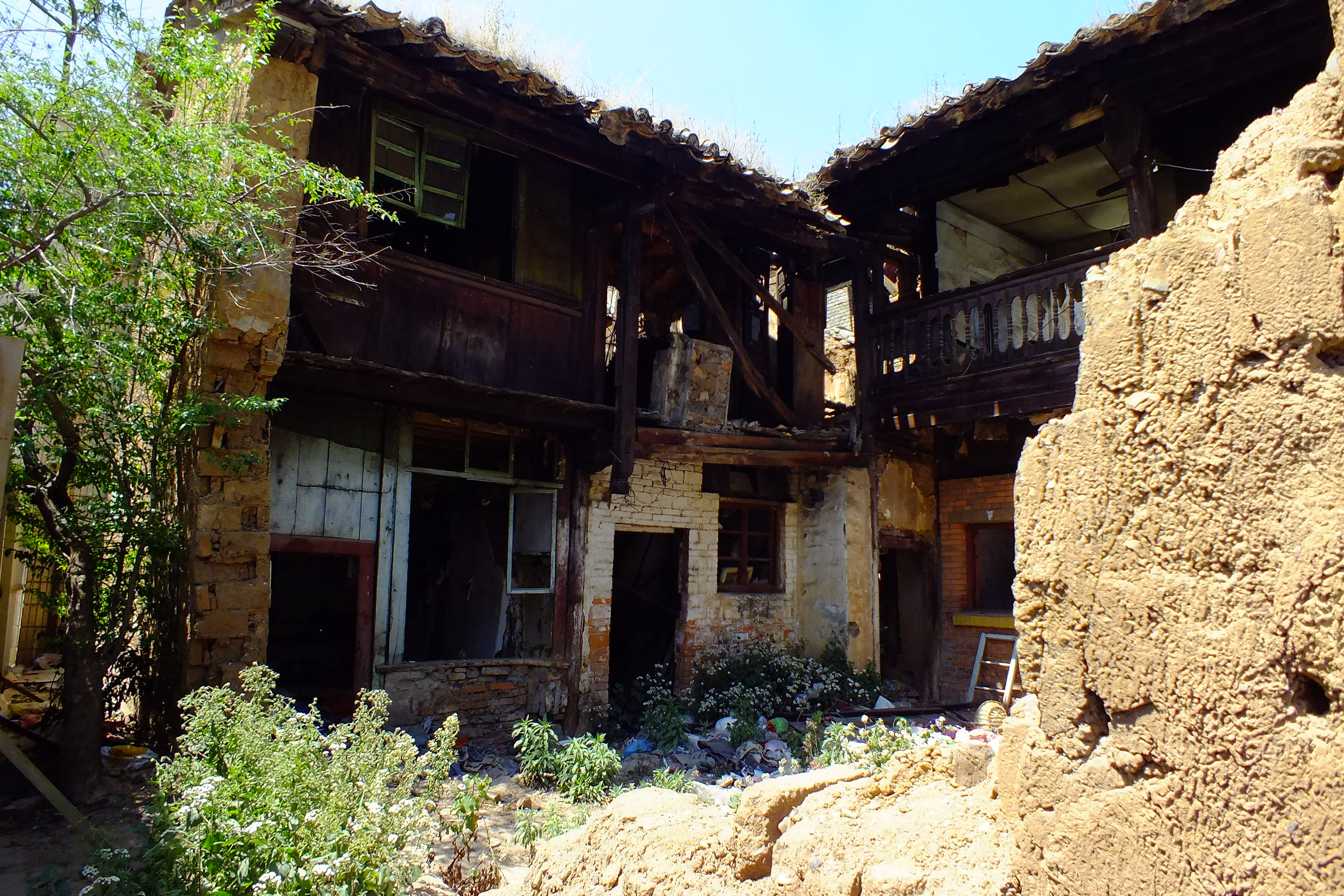 2015-03-20 Wuhua District, Yunnan, Kunming(雲南省昆明市五華区, 中国)